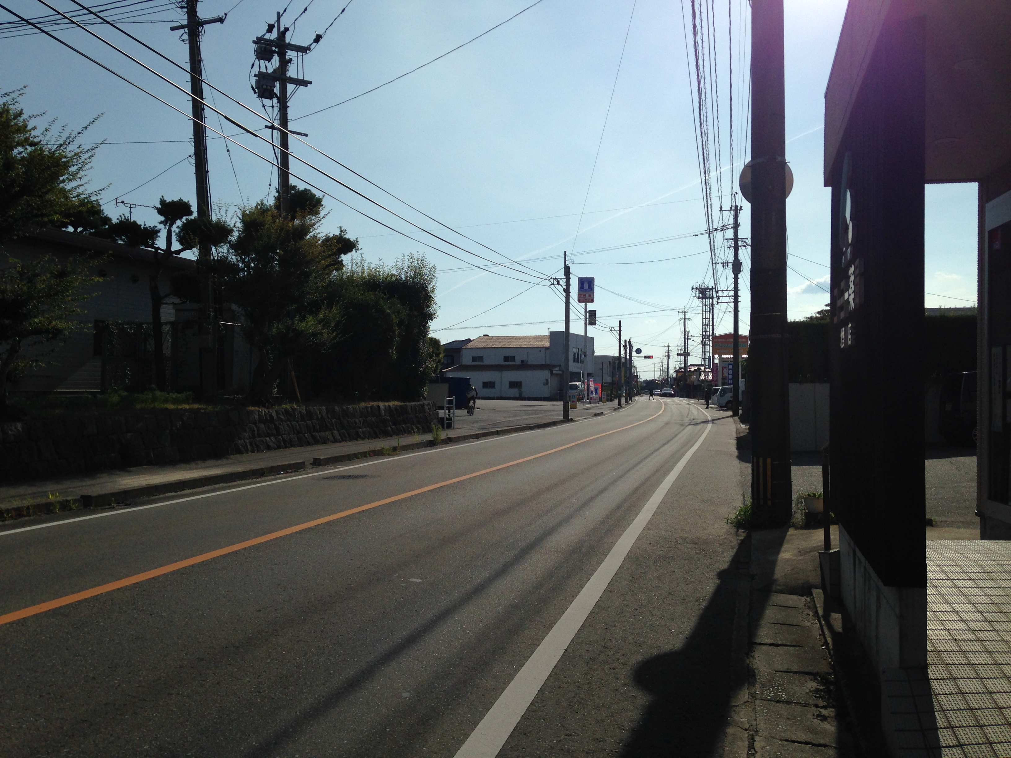 北野駅(福岡県)南側付近の福岡県道53号